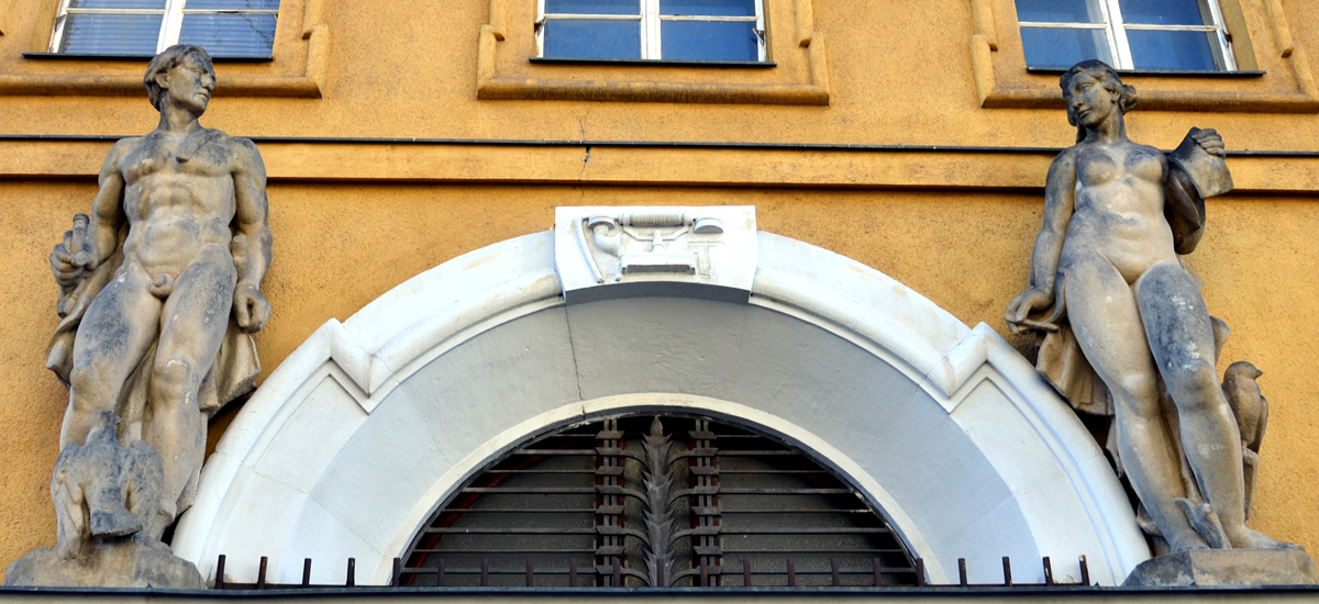 Ladislav Kofránek, Mezinárodní telefonní ústředna, Fibichova, Praha (2. vchod), 1926